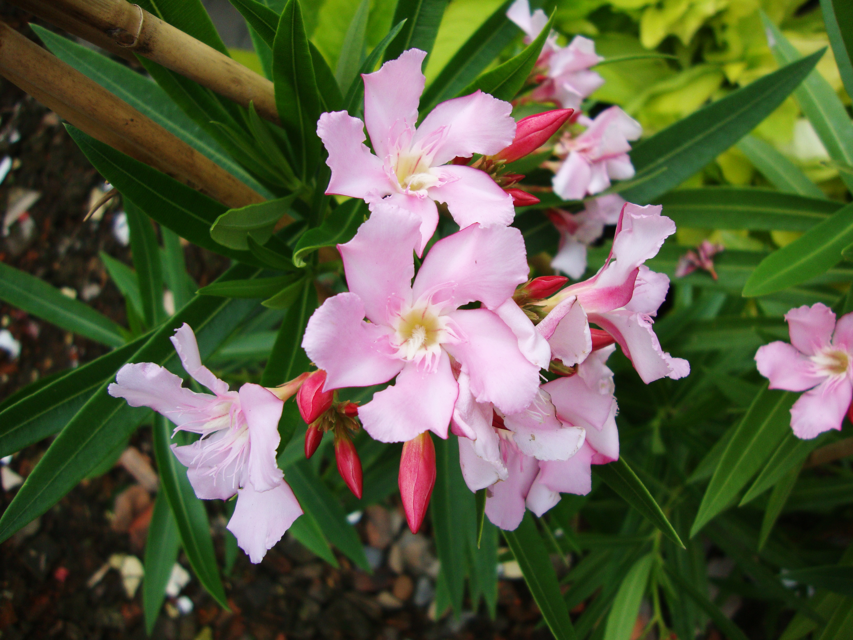 Nerium oleander L., 1753Tiếng Việt: Trúc đào